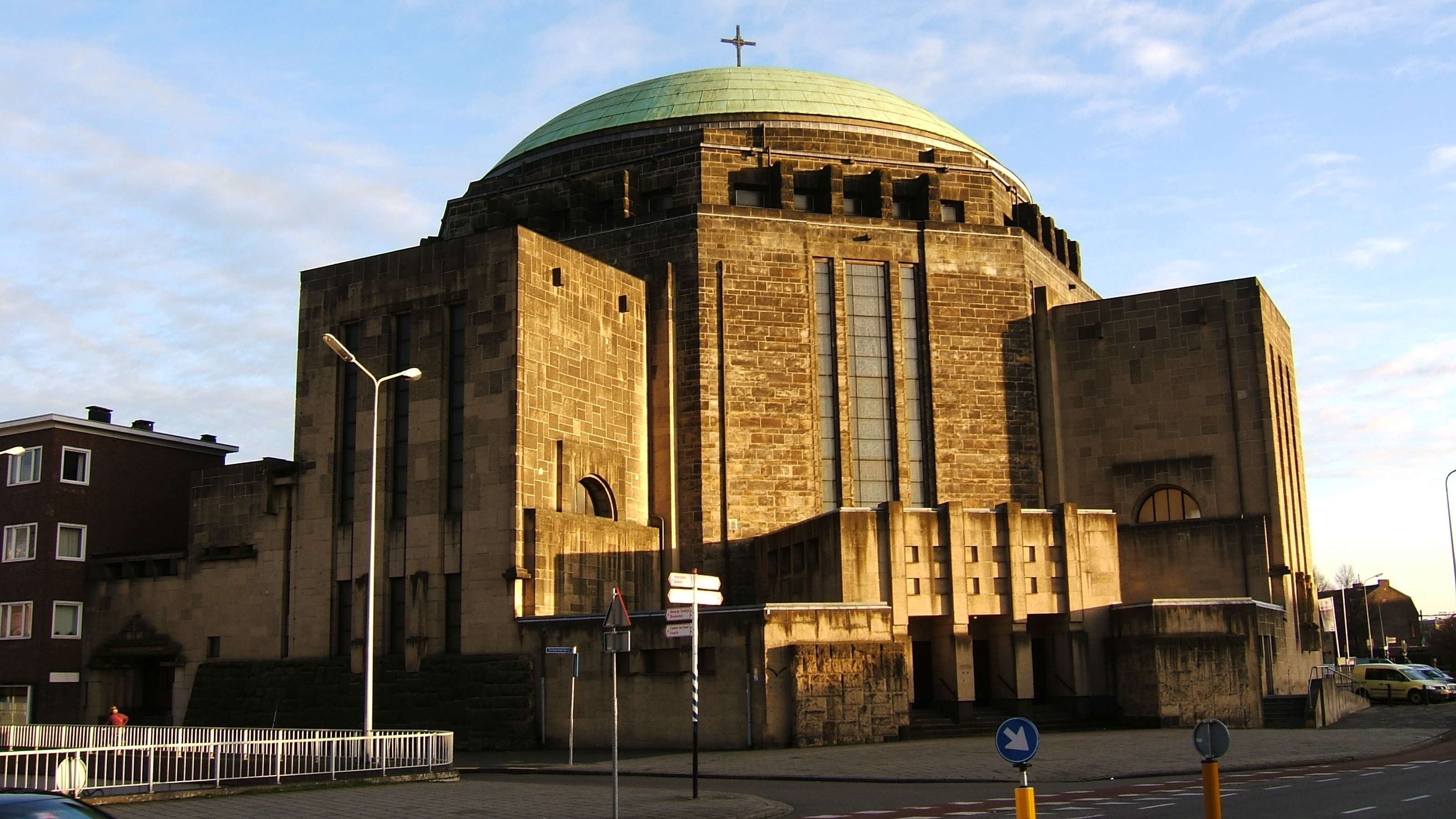 MaastrichtVooraanzijde Koepelkerk Maastricht